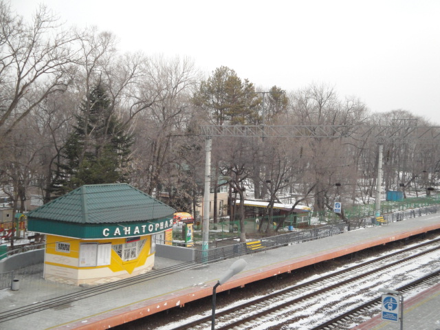 Платформа Санаторная Владивостокского отделения Дальневосточной железной дороги.